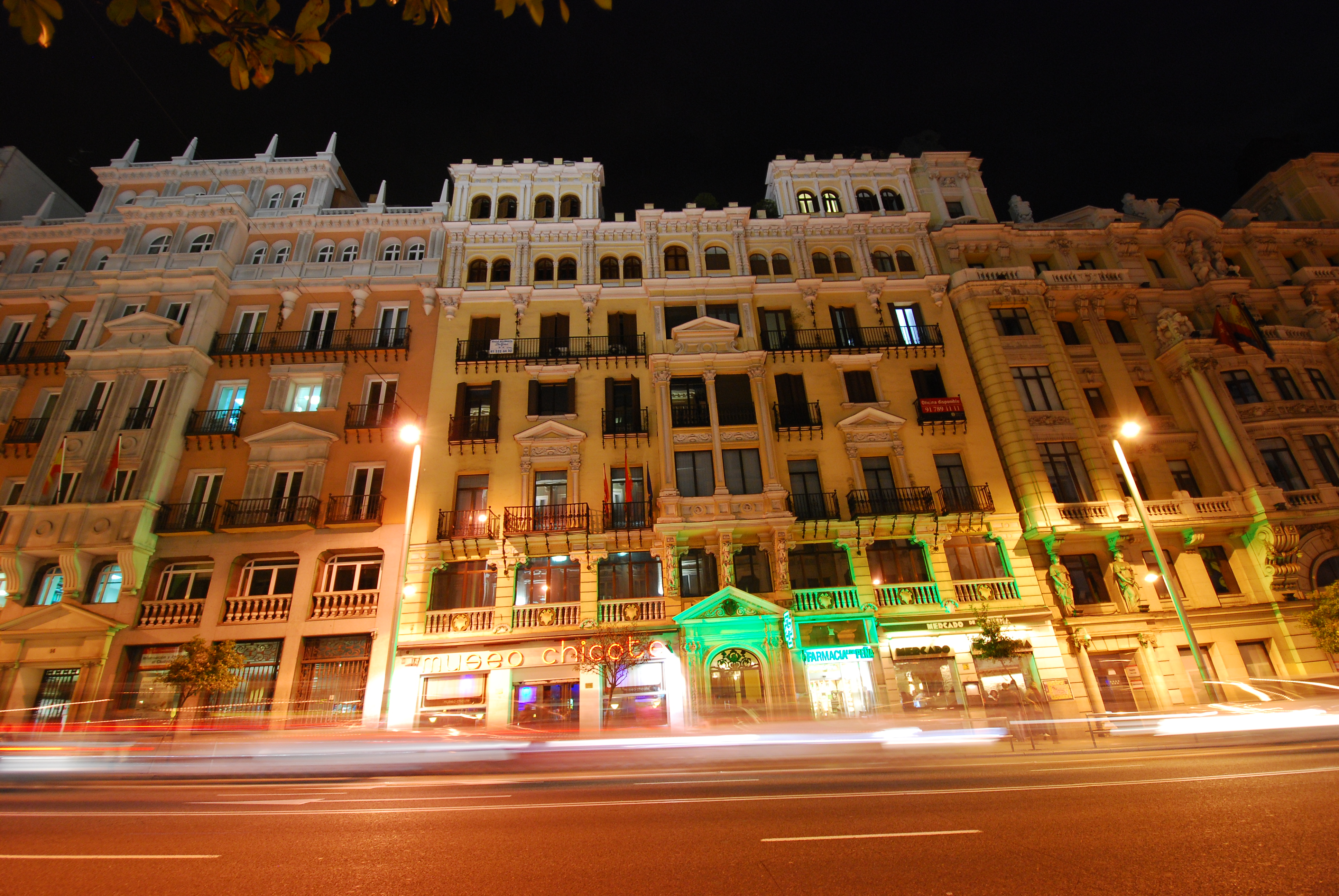 Facha de Gran Vía 12, Madrid, con el Museo Chicote